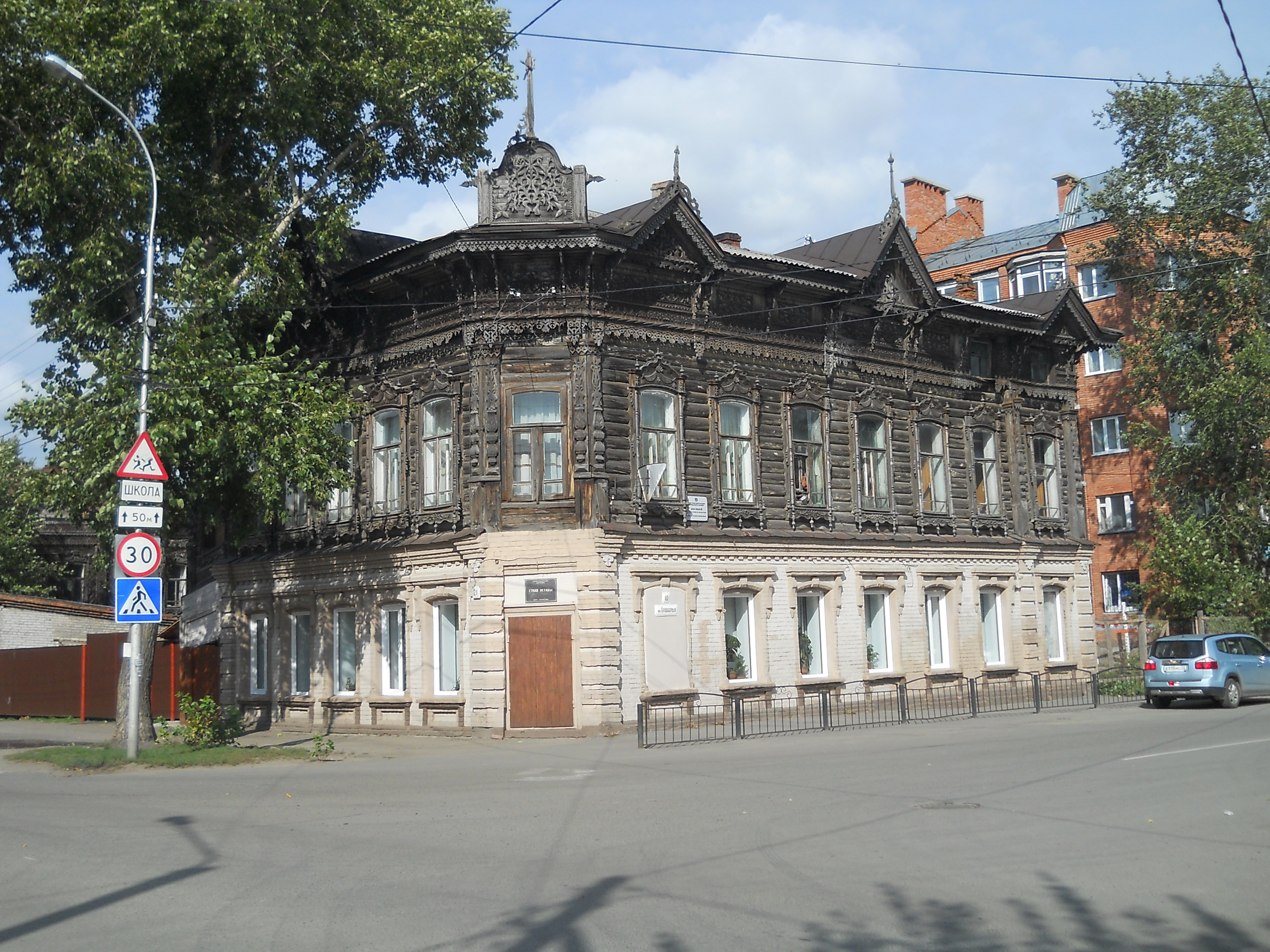 Дом по адресу Томск, ул. Войкова, 21. Второй этаж жилой, на первом сейчас располагается молельный дом христианской евангелической церкви "Столп Истины"